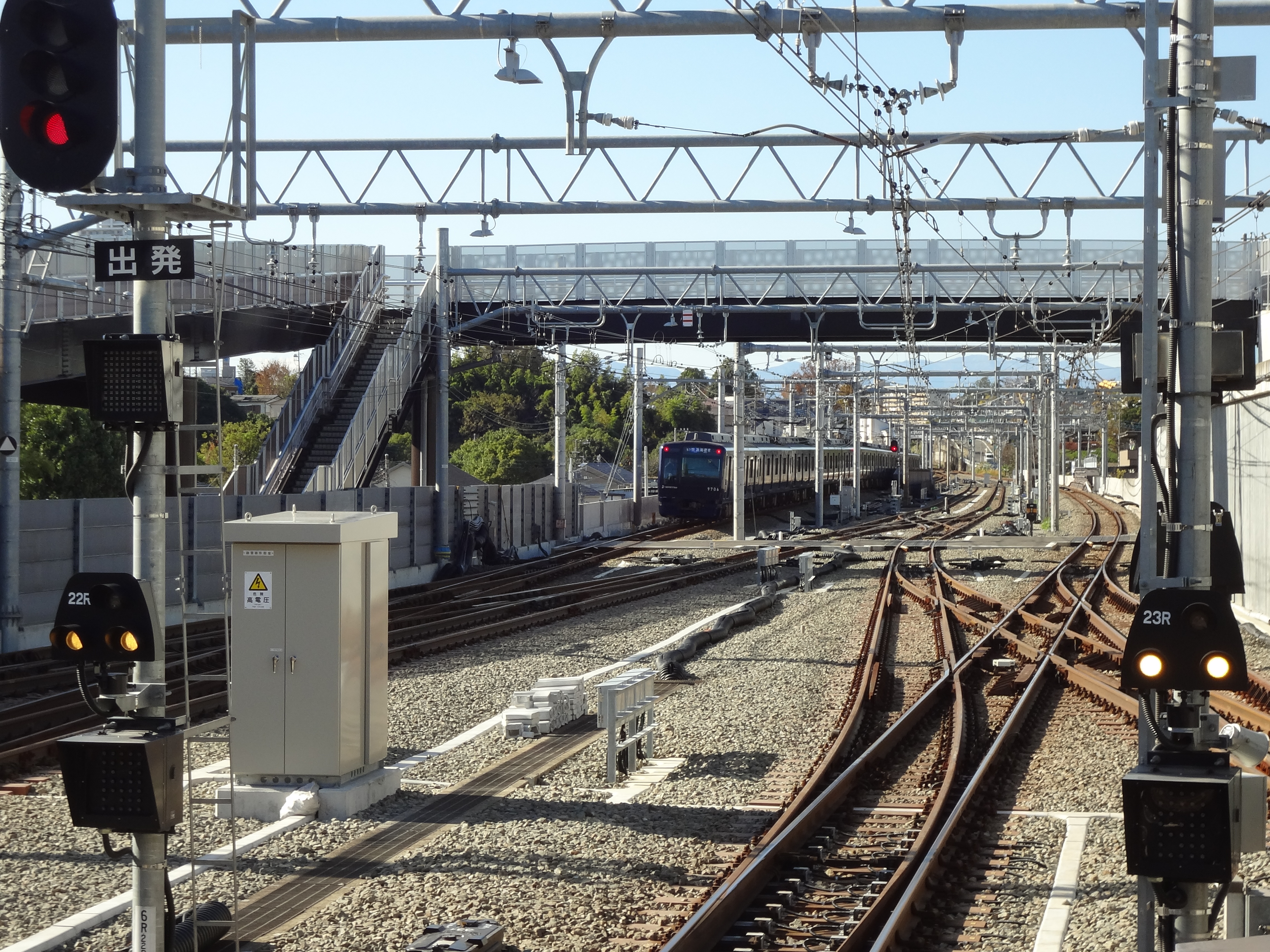 鶴ヶ峰方の引き上げ線で外側が本線、内側が引き上げ線。